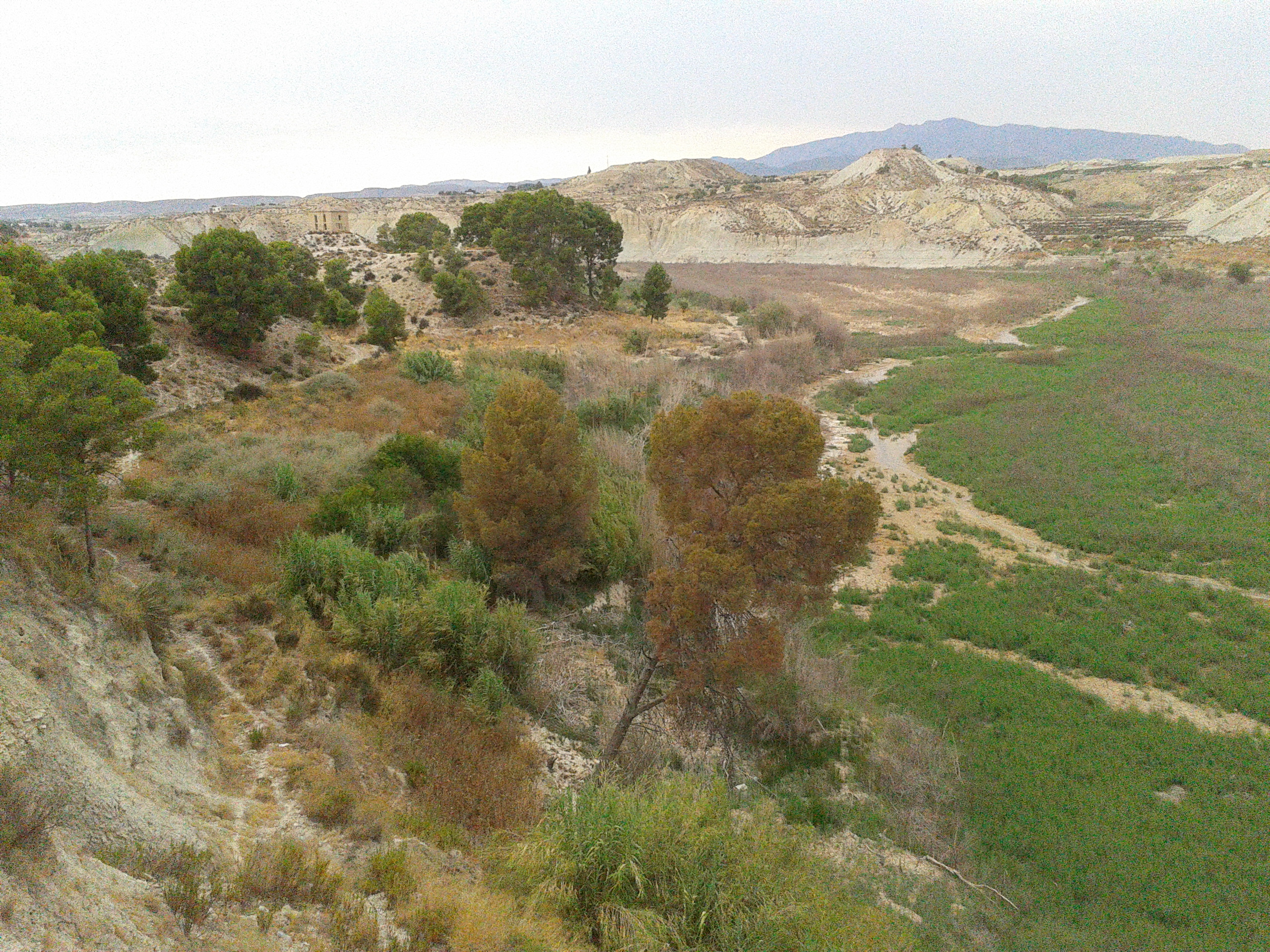 Río Mula y paisajes del Rodeo de la Ermita. Con el Palomar Payá de fines del siglo XIX al fondo.